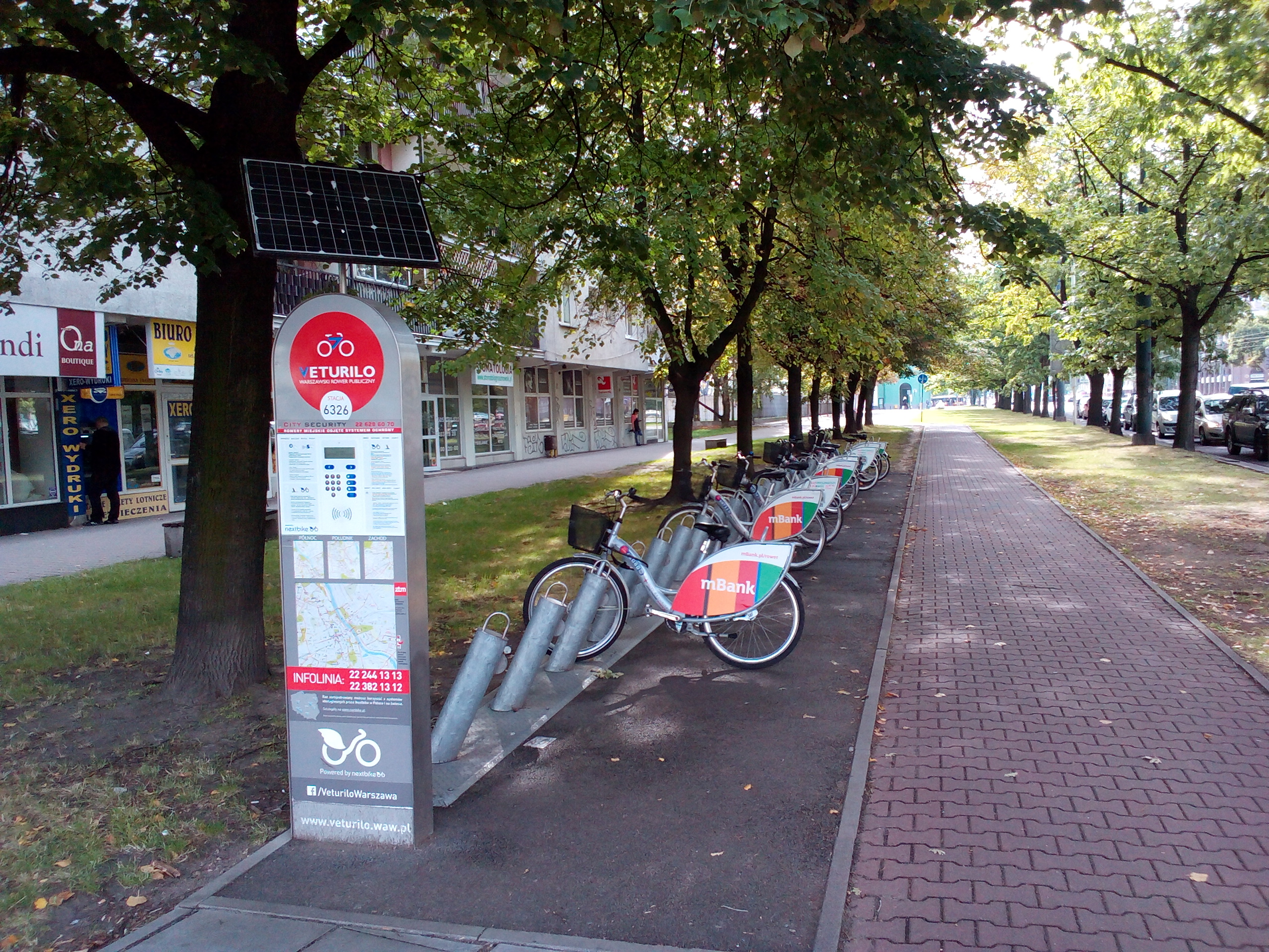 Stacio nr-o 6326 de Varsovia urba prunteprena bicikla sistemo Veturilo. The code number of this Zamenhof/Esperanto object is pl-052. Wikidata has entry Q57081548 with data related to this item.